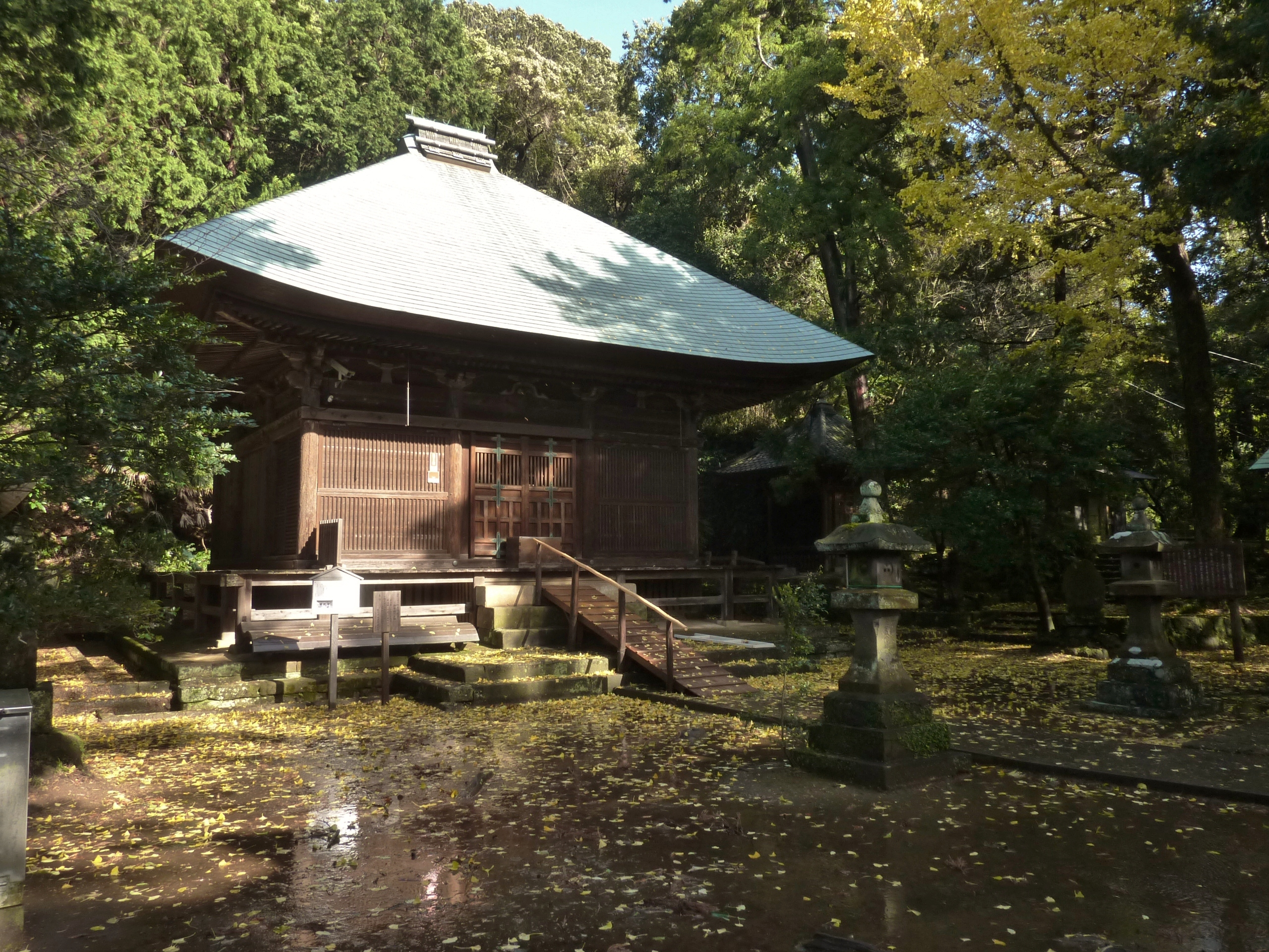 神武寺の薬師堂（神奈川県逗子市）